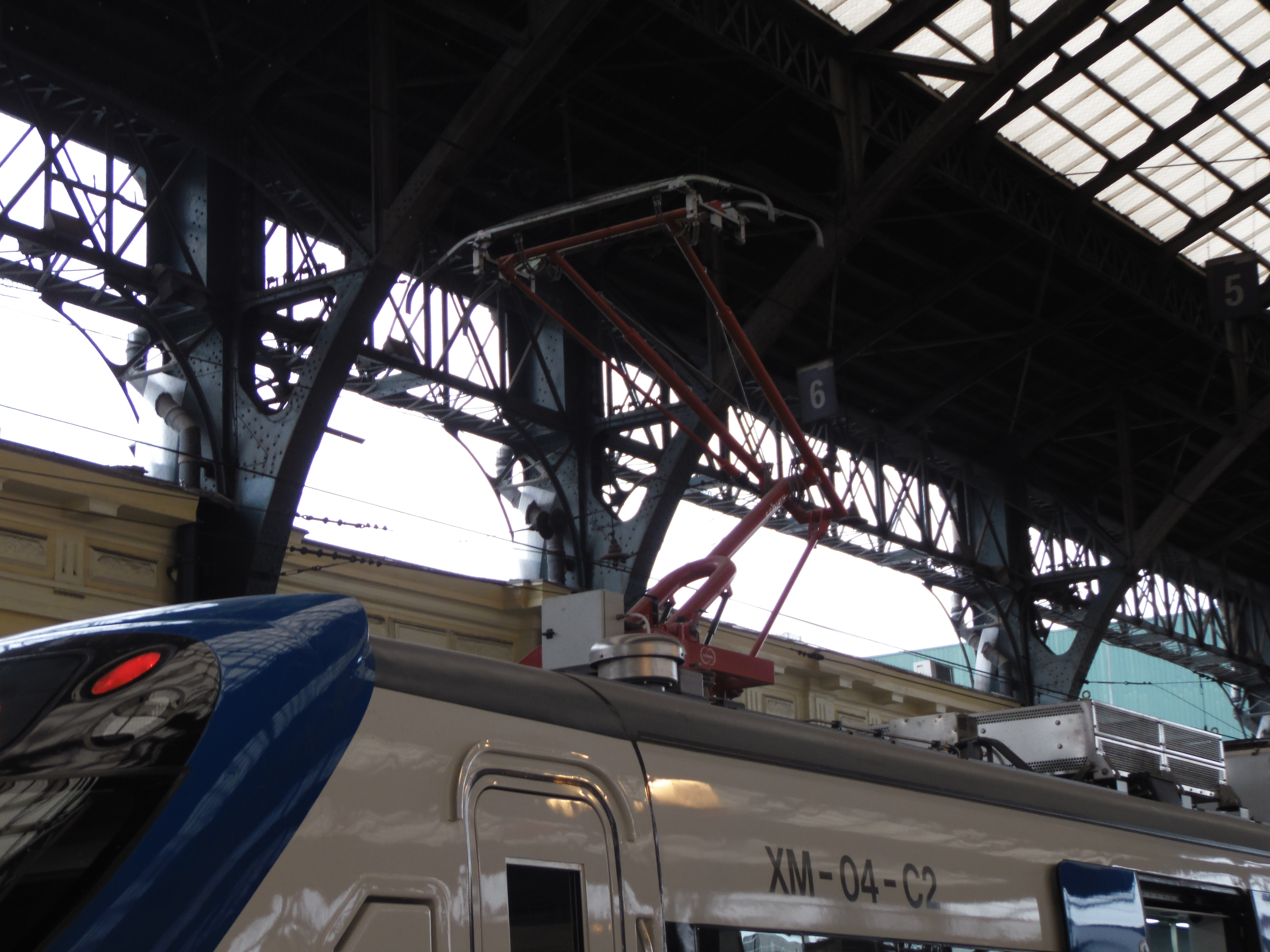 Pantógrafo delantero XM-04